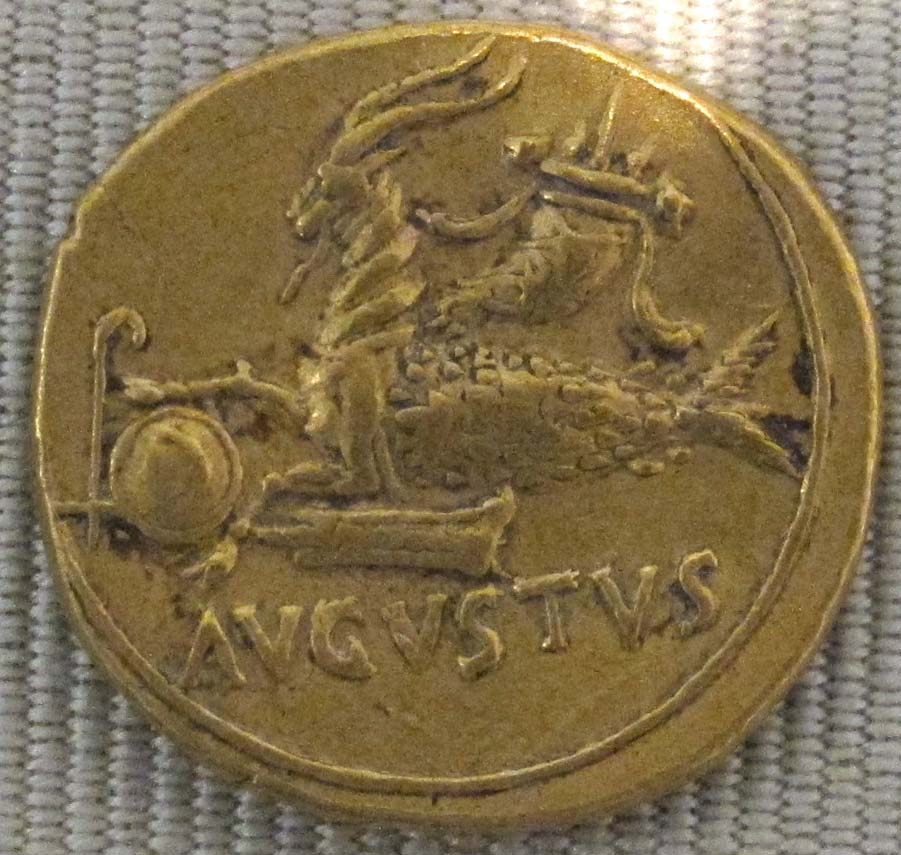 Impero, augusto, aureo (colonia patricia), 17-16 ac.